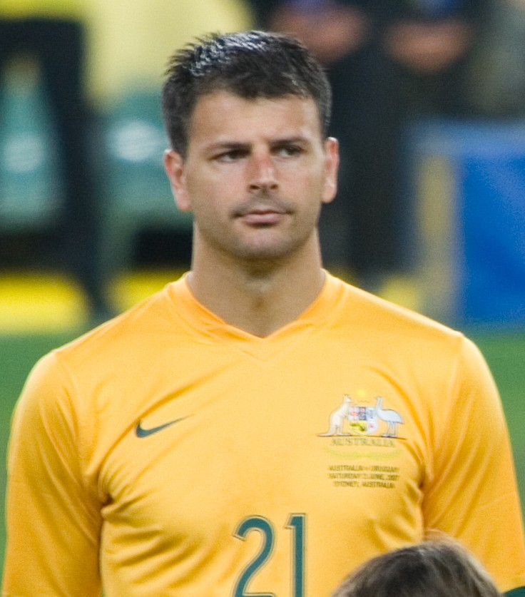 Mile Sterjovski.